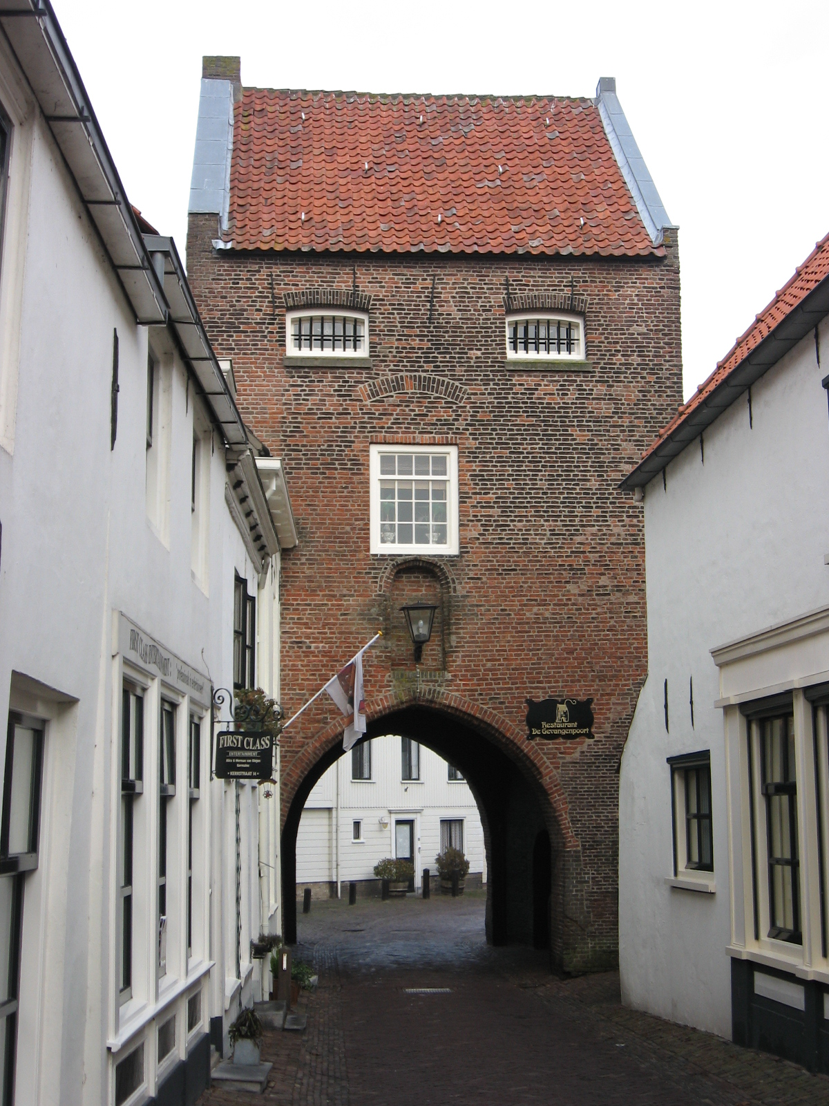 Woudrichem